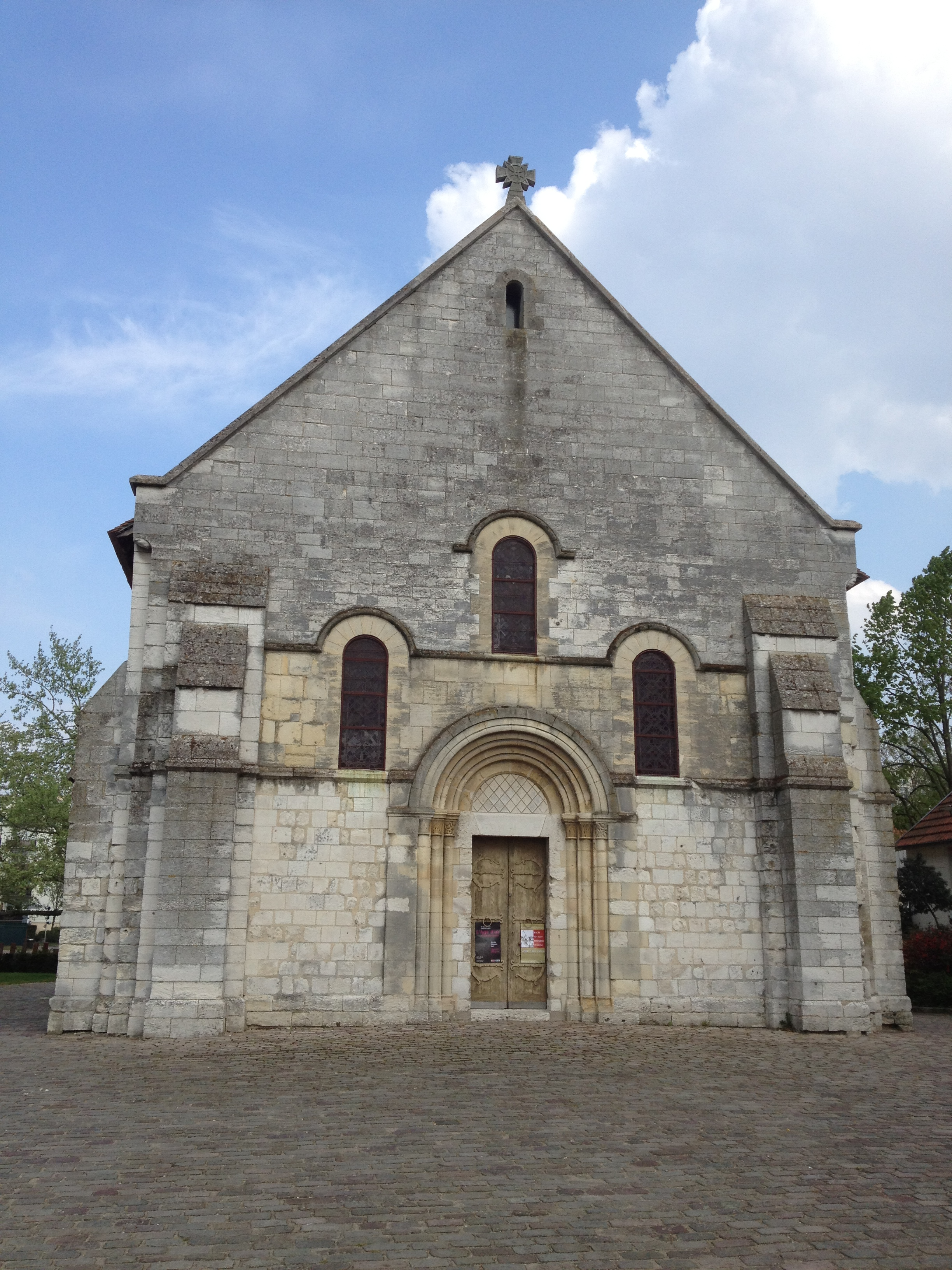 Façade occidentale de la chapelle Saint-Julien.